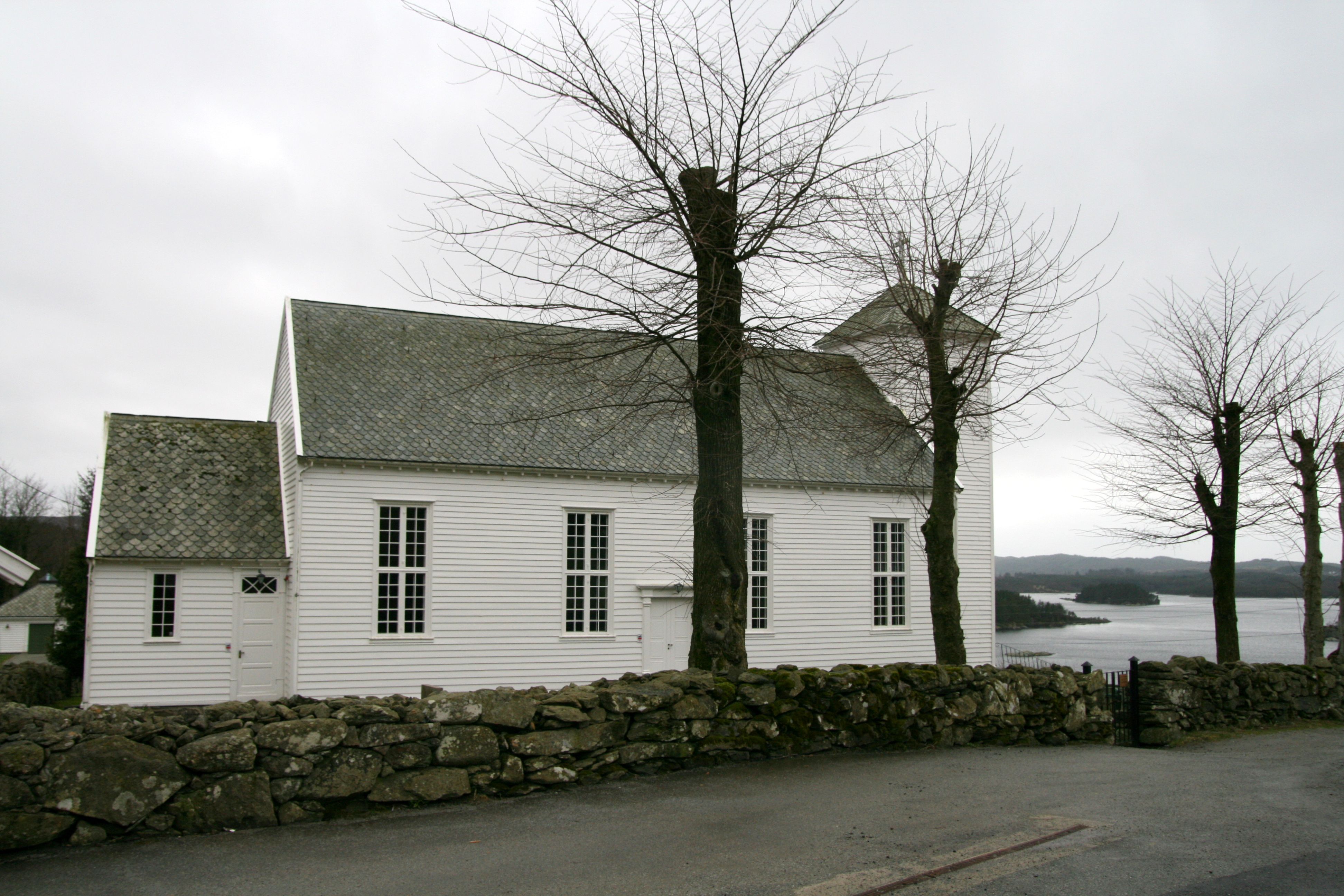 Tysvær kirke